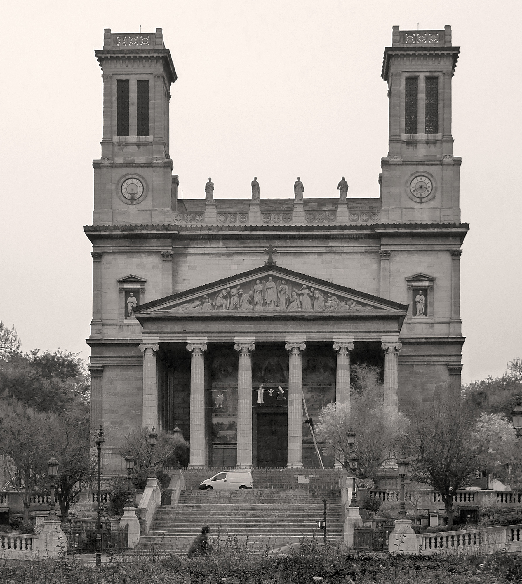 Église Saint-Vincent-de-Paul (façade) - Paris X